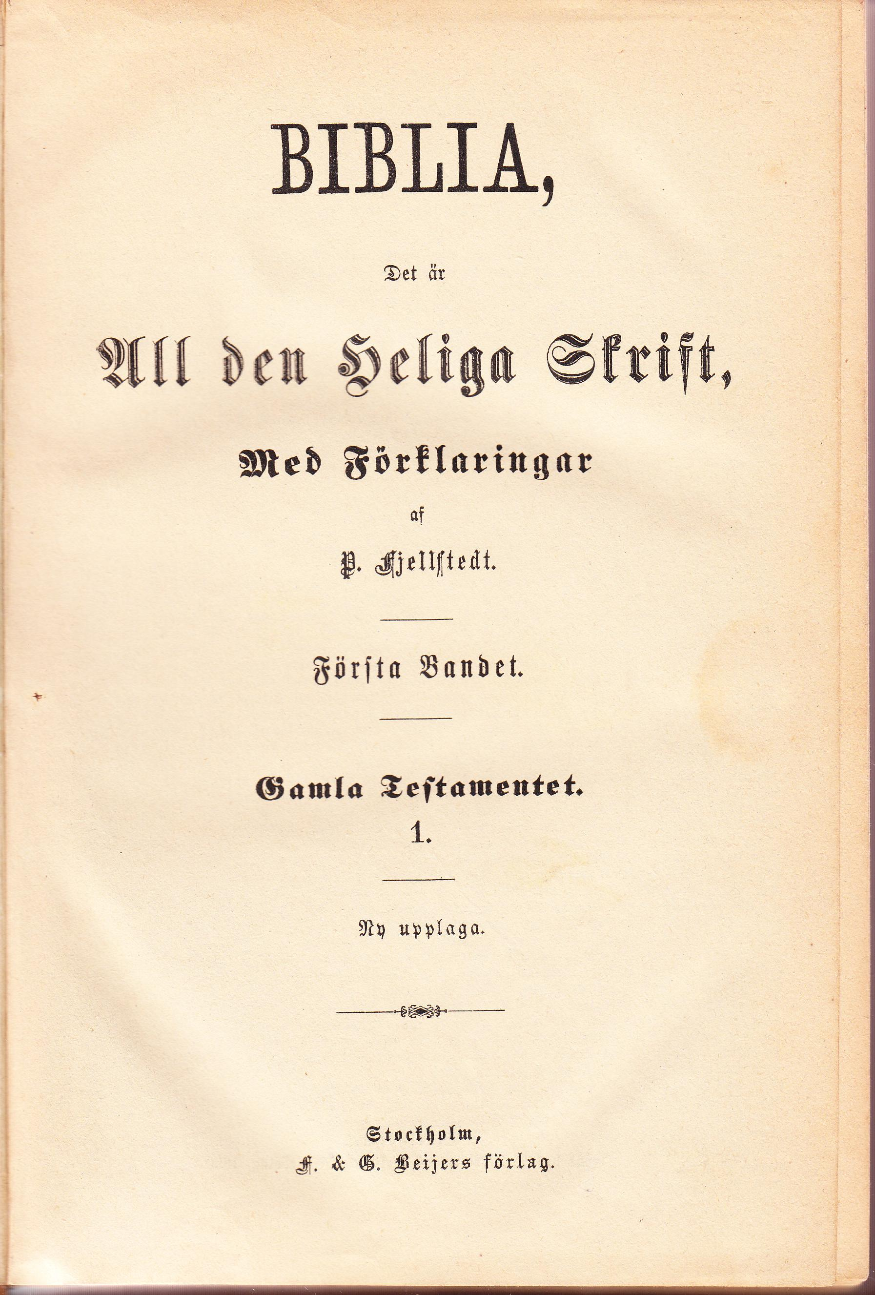 Scannad bild av Peter Fjellstedts bibel med kommentarer uppl 1890 del I